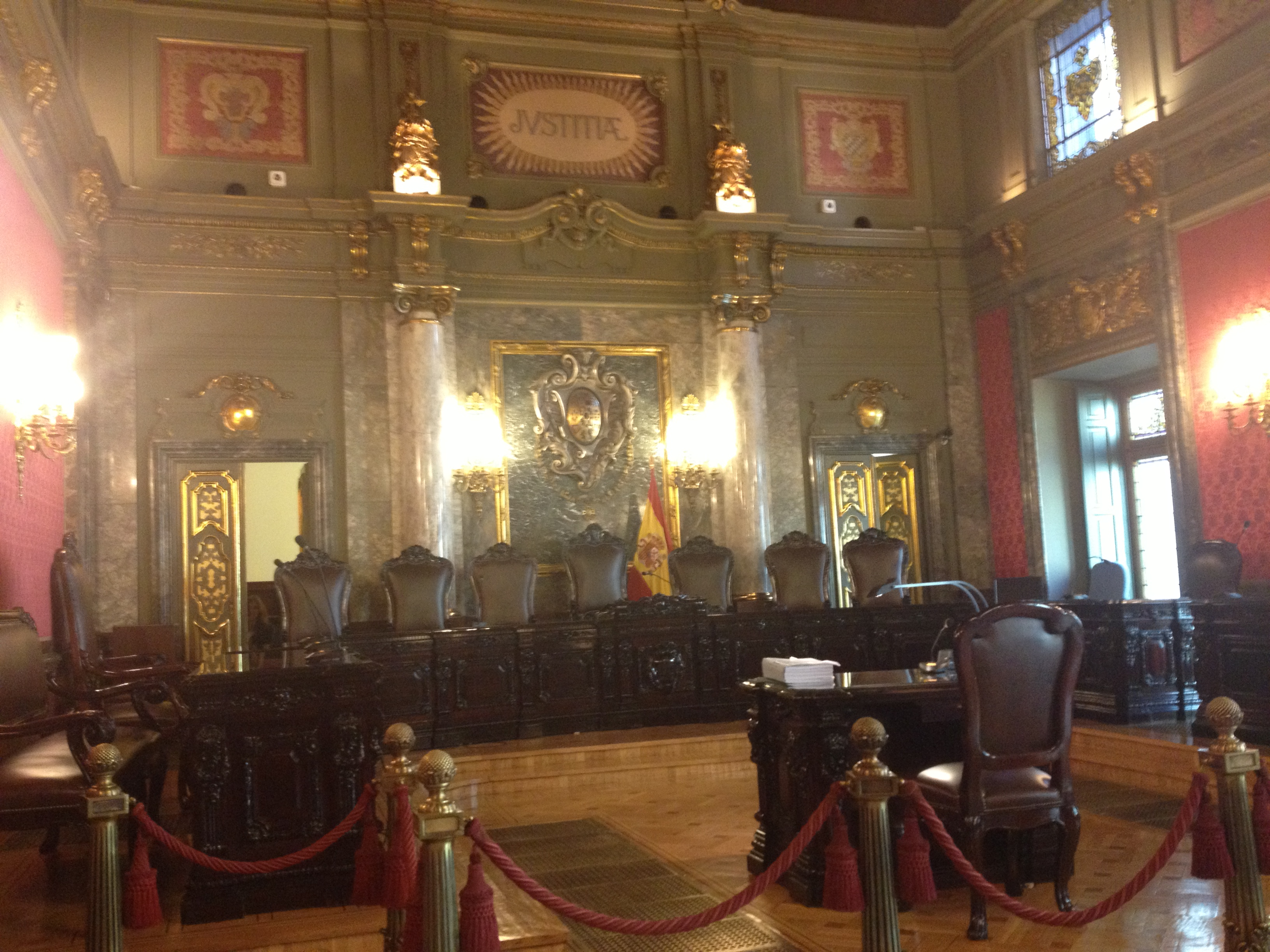 Interior de la Sala Segunda del Tribunal Supremo.